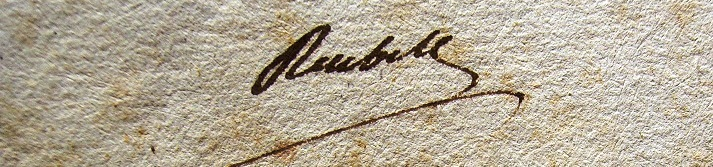 Jean-François Rewbell signed